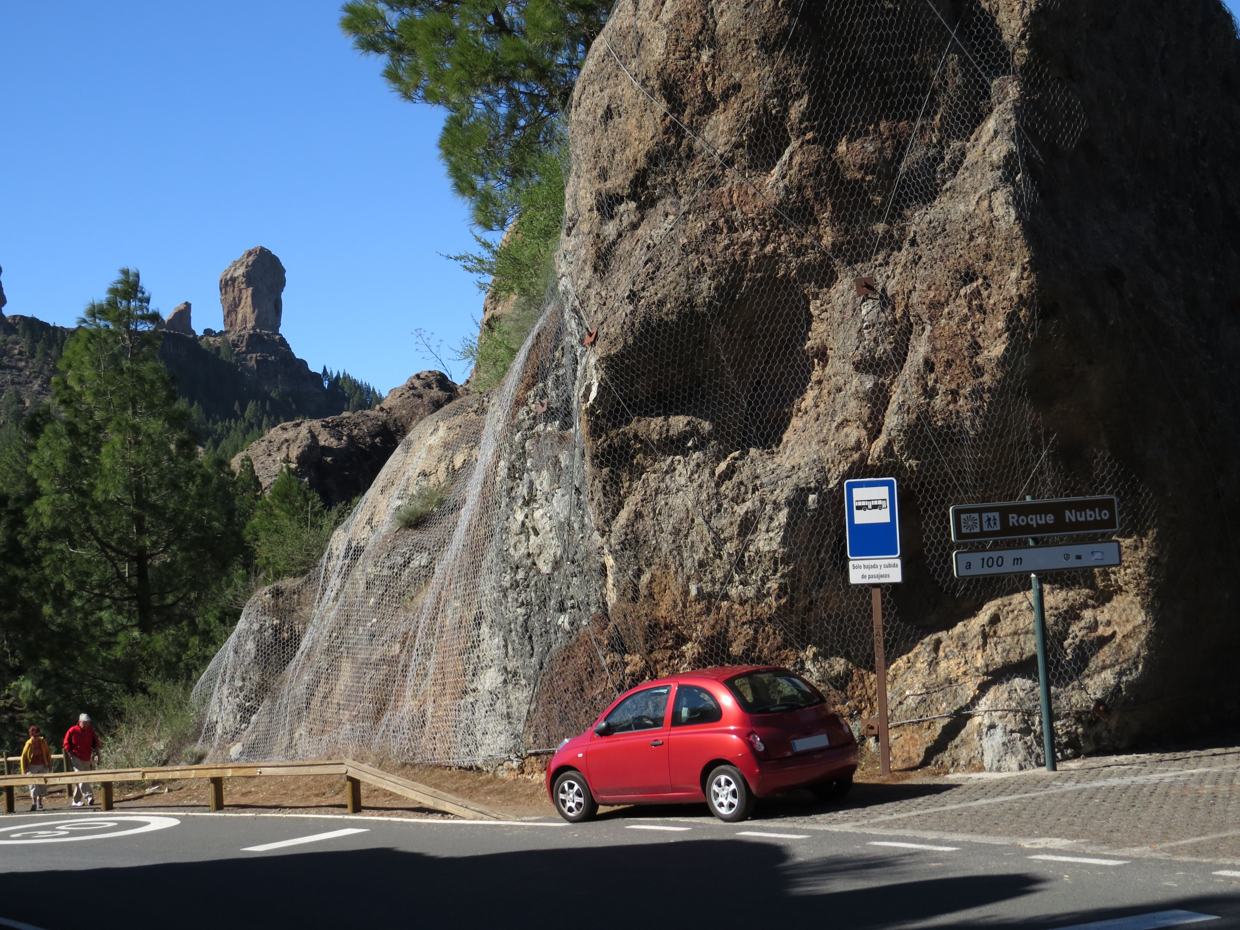 Roque Nublo. Gran Canaria, Islas Canarias, España